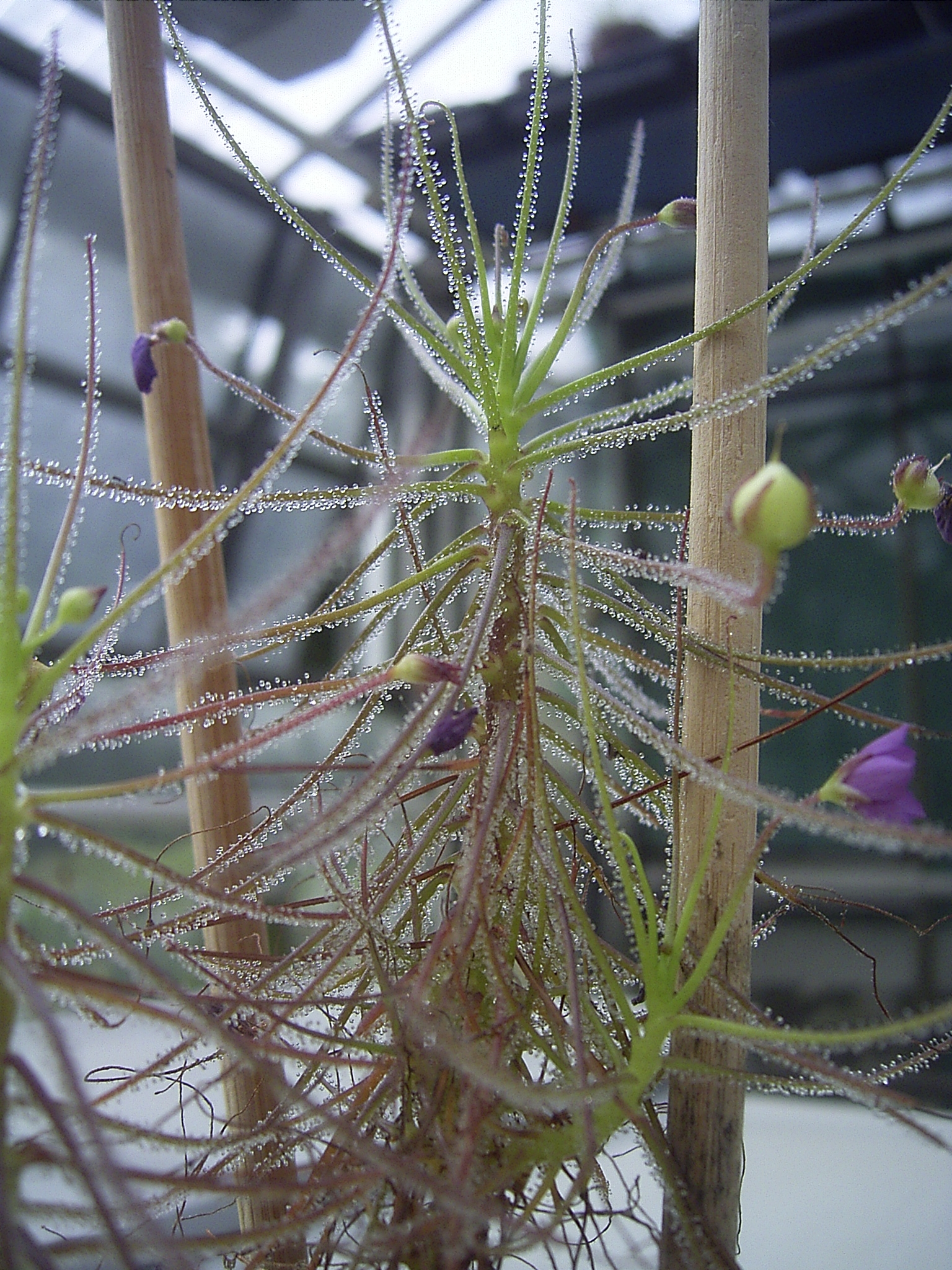 Byblis aquatica habitus